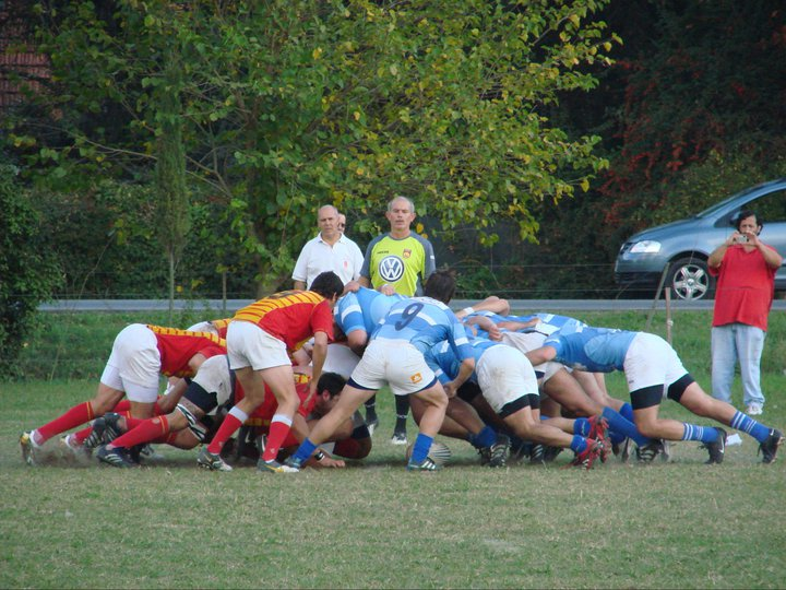 Scrum lujanense.